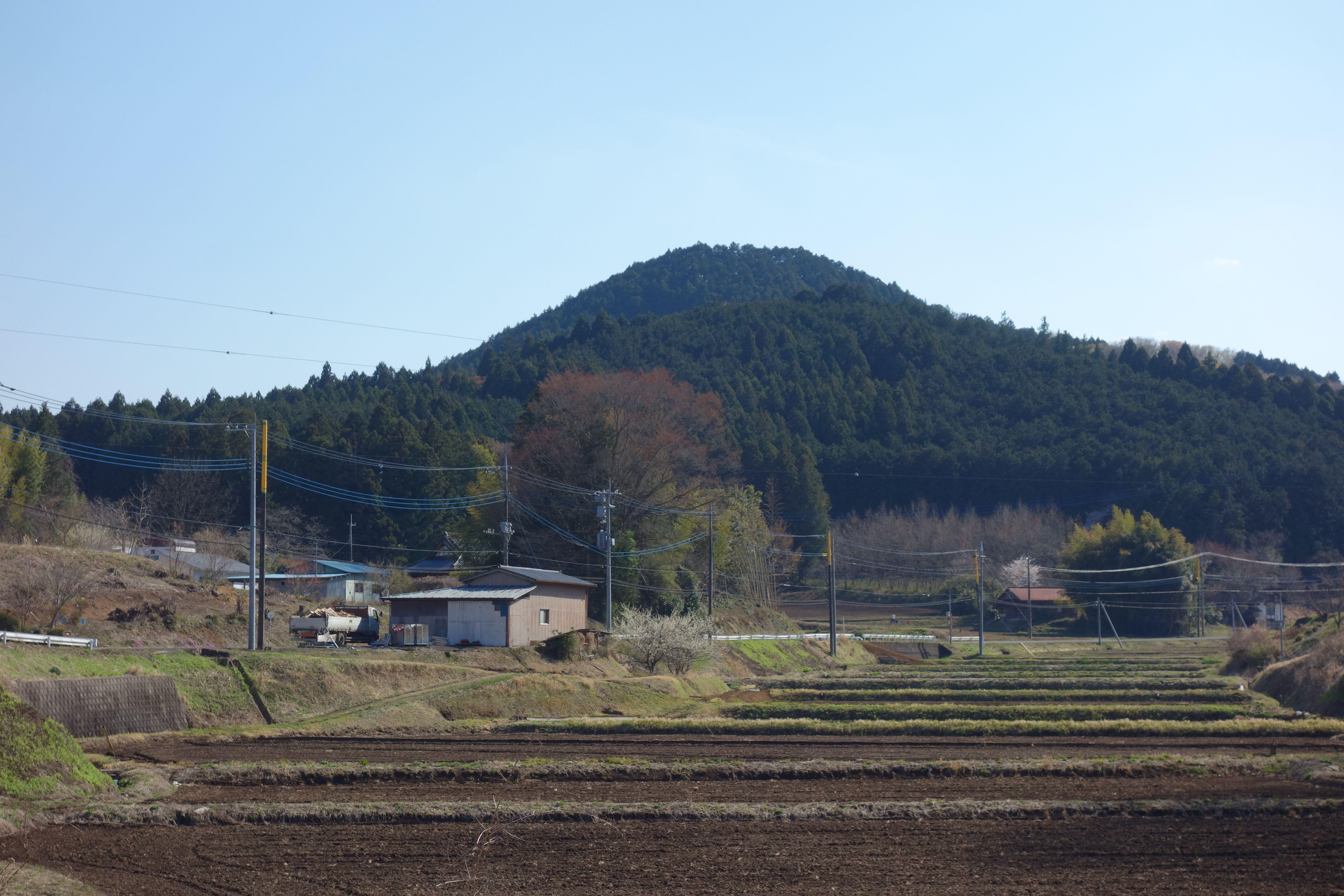 栃木県の芳賀富士を北北東から望む